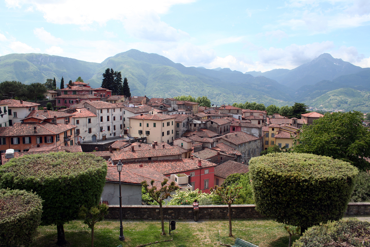 Barga, Toscana, Italia